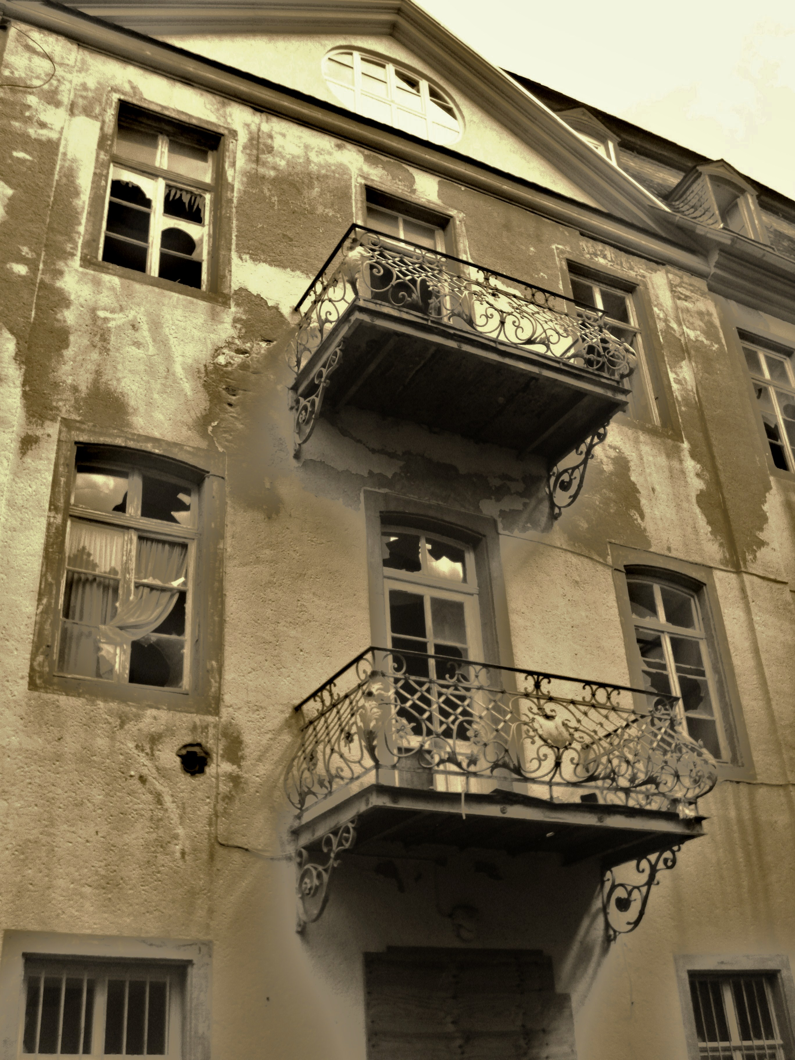 LostPlaceBoppard